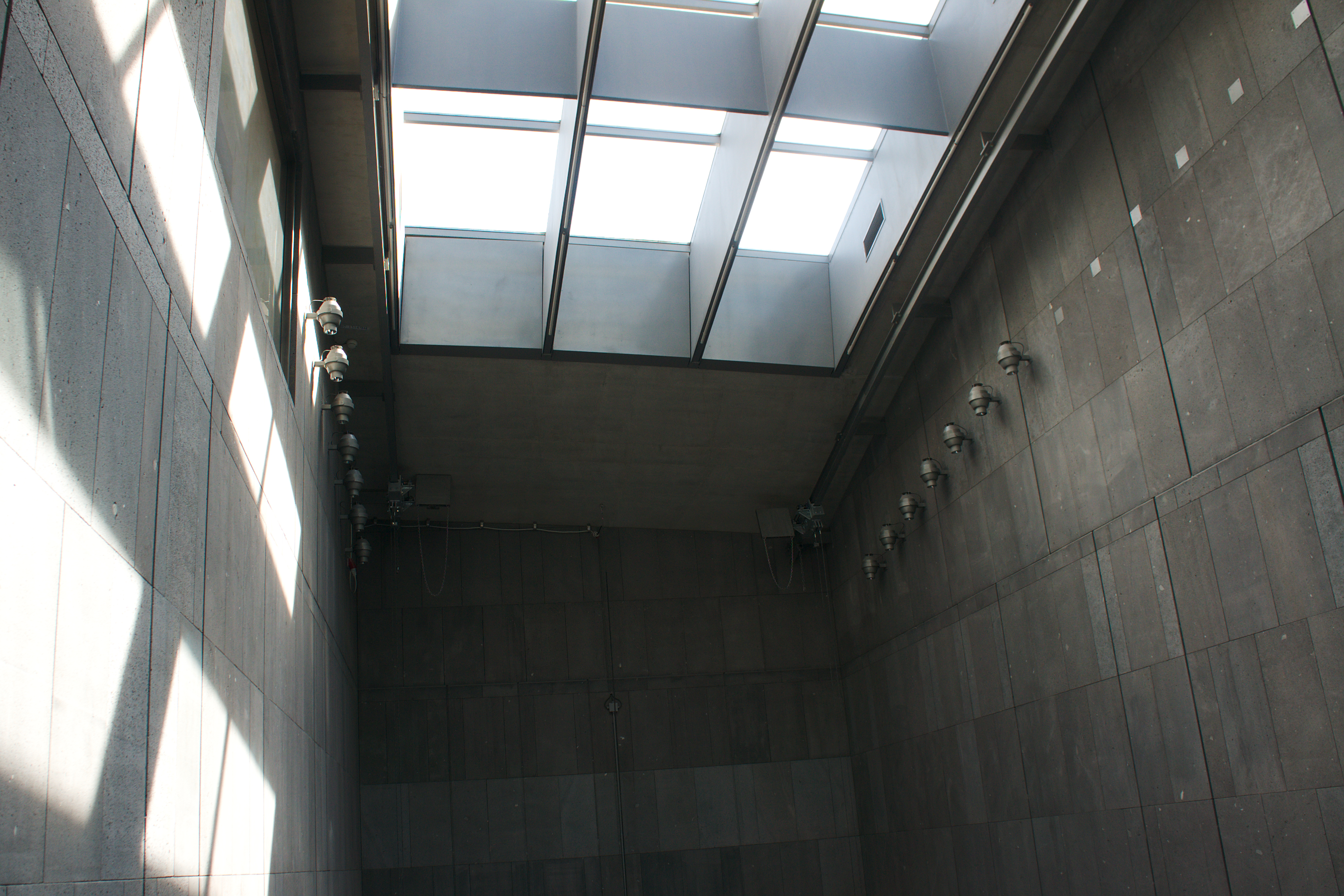 Intérieur du musée d'art moderne de Vienne en Autriche.